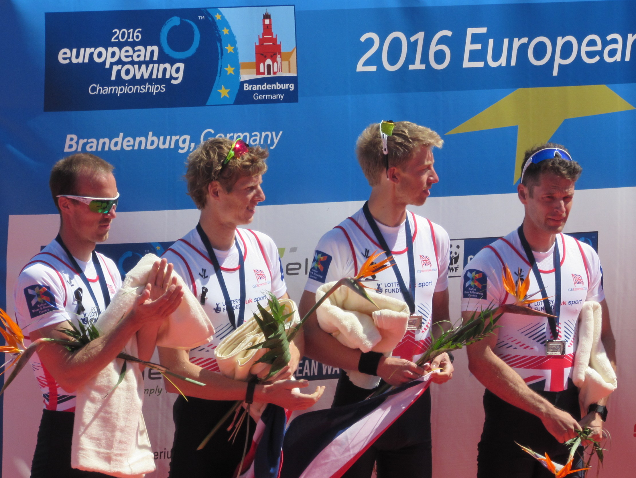 Chris Bartley, Mark Aldred, Jono Clegg, Peter Chambers, Ruder-EM 2016